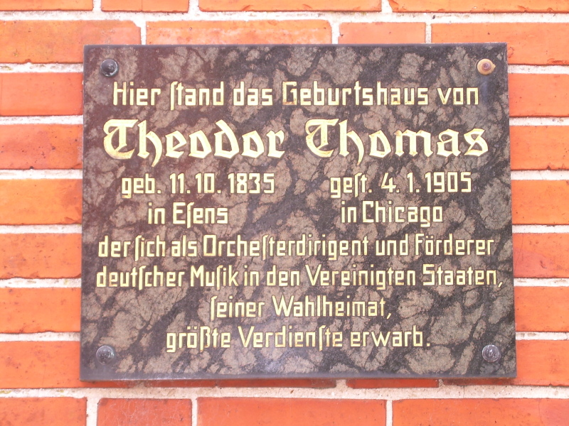 Gedenktafel des Komponisten Theodor Thomas am Standort seines Geburtshauses in Esens/Ostfriesland in der Theodor-Thomas-Strasse. Er wanderte aus und leitete später das Chicago Symphony Orchestra.